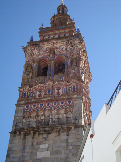 torre, ( estilo barroco) de la iglesia de san bartoloé, Jerez de los caballeros.